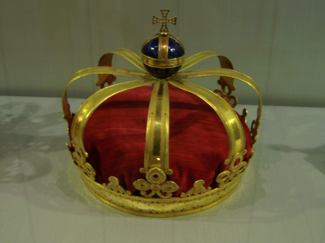 preussische Königskrone